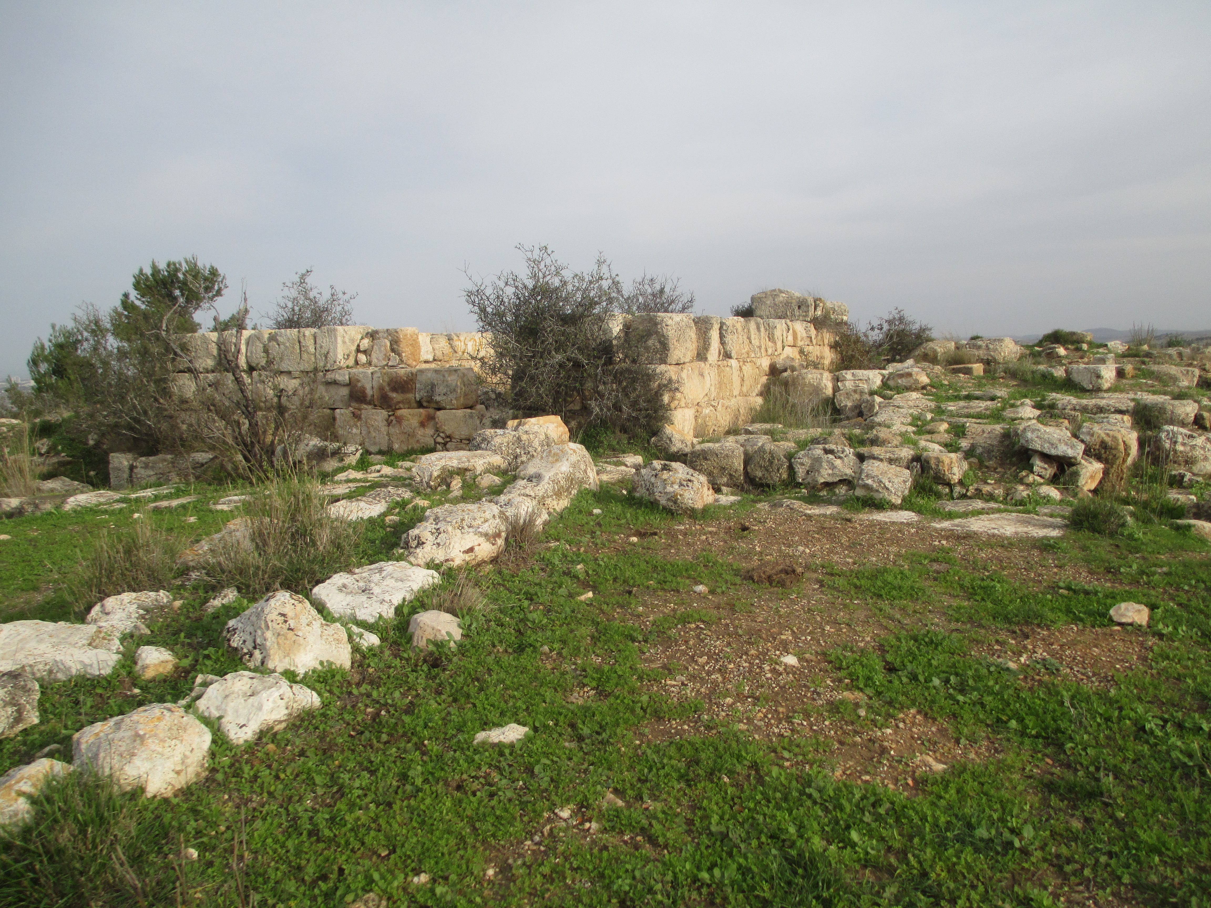 חורבת מצד